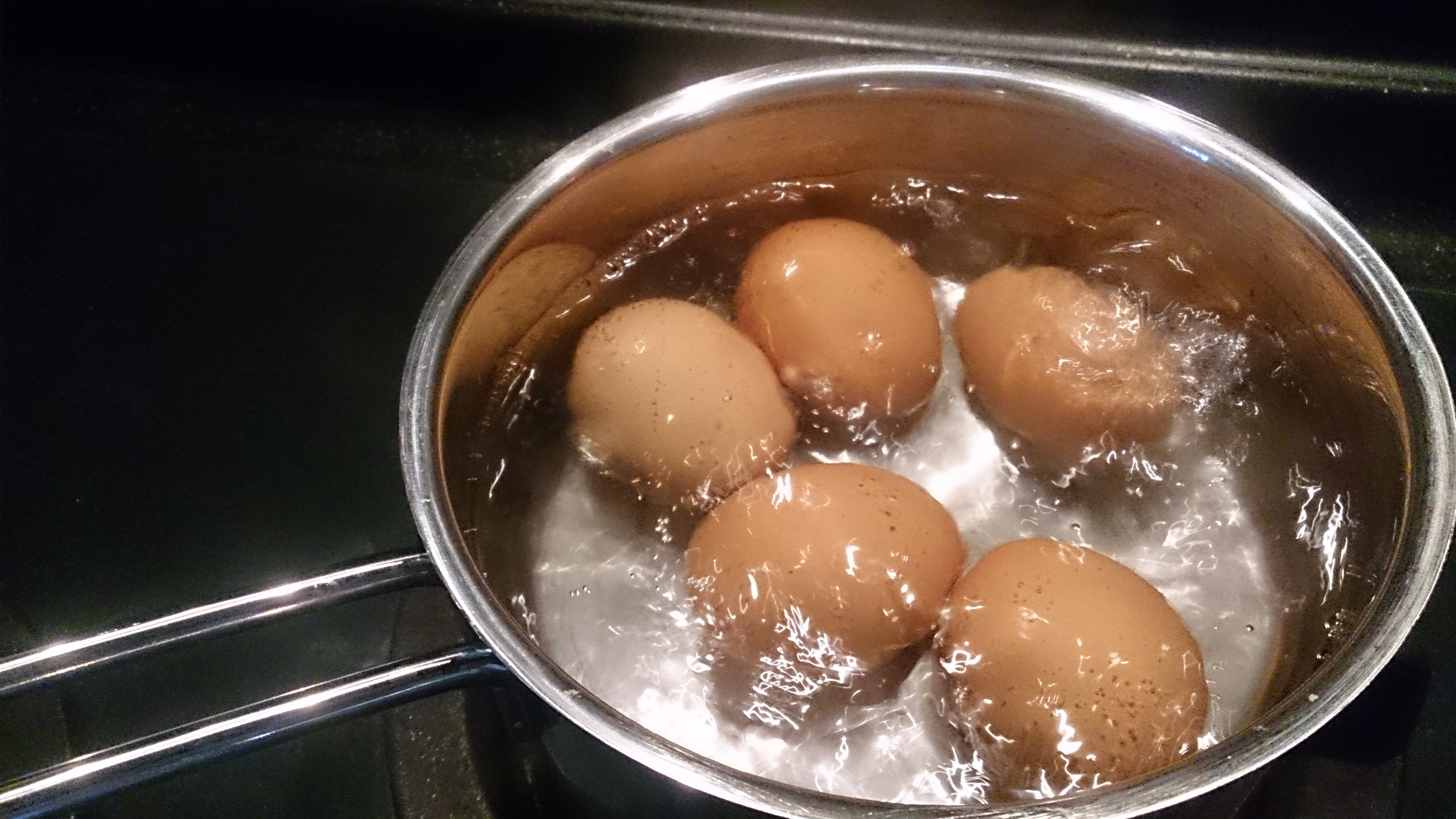 boiling eggs